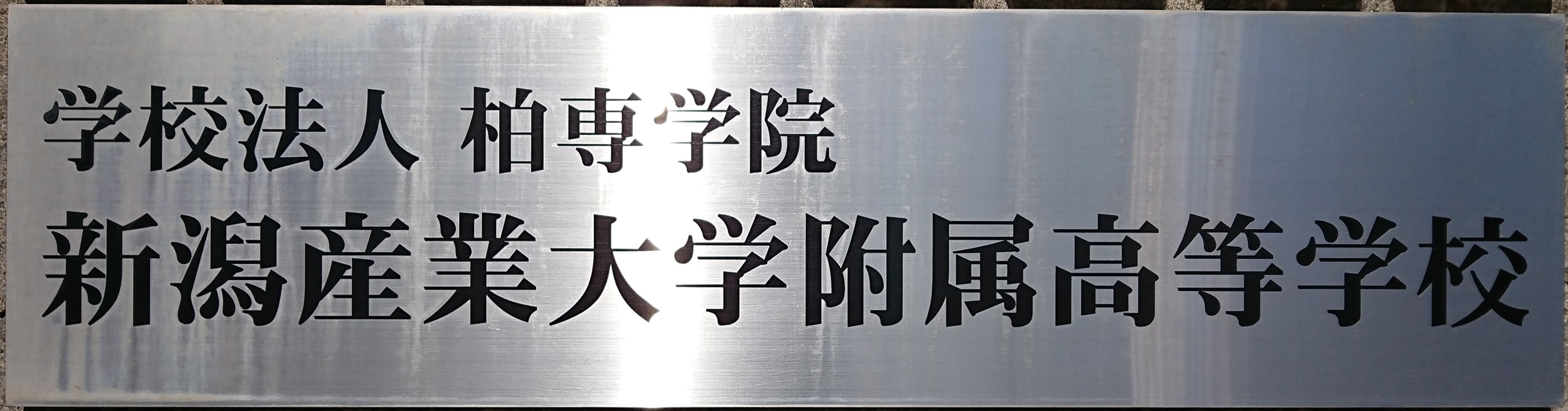 新潟産業大学付属高等学校の学校表示